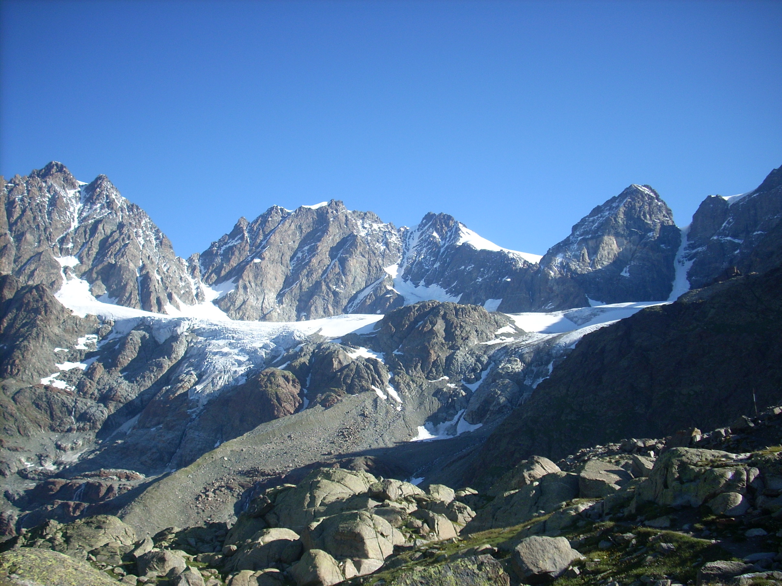 GRUPPO DEL BERNINA